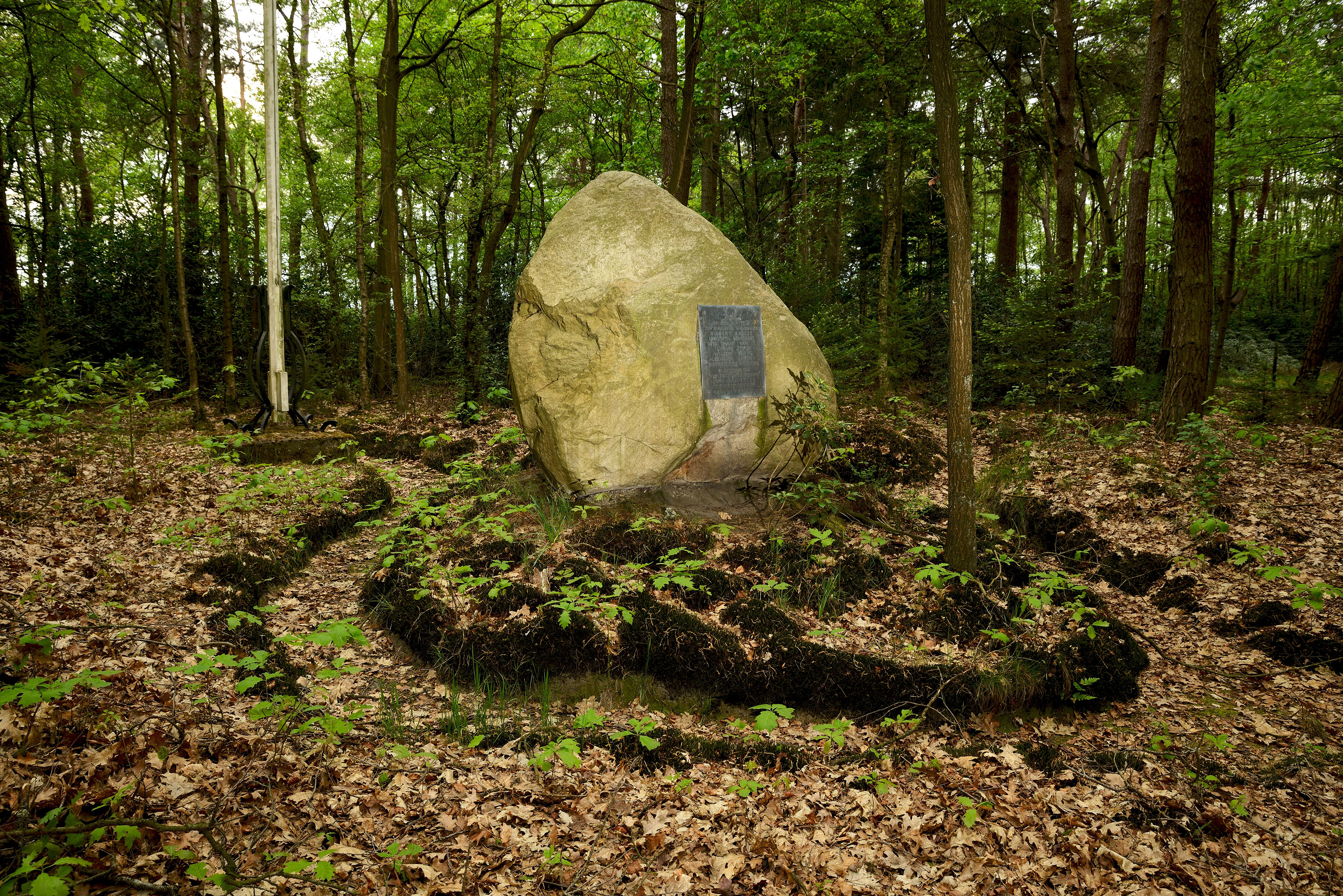 Gedenkmonument op landgoed Gorp en Roovert in Hilvarenbeek. Een zwerfkei met een plaquette met namen van de gevallenen.